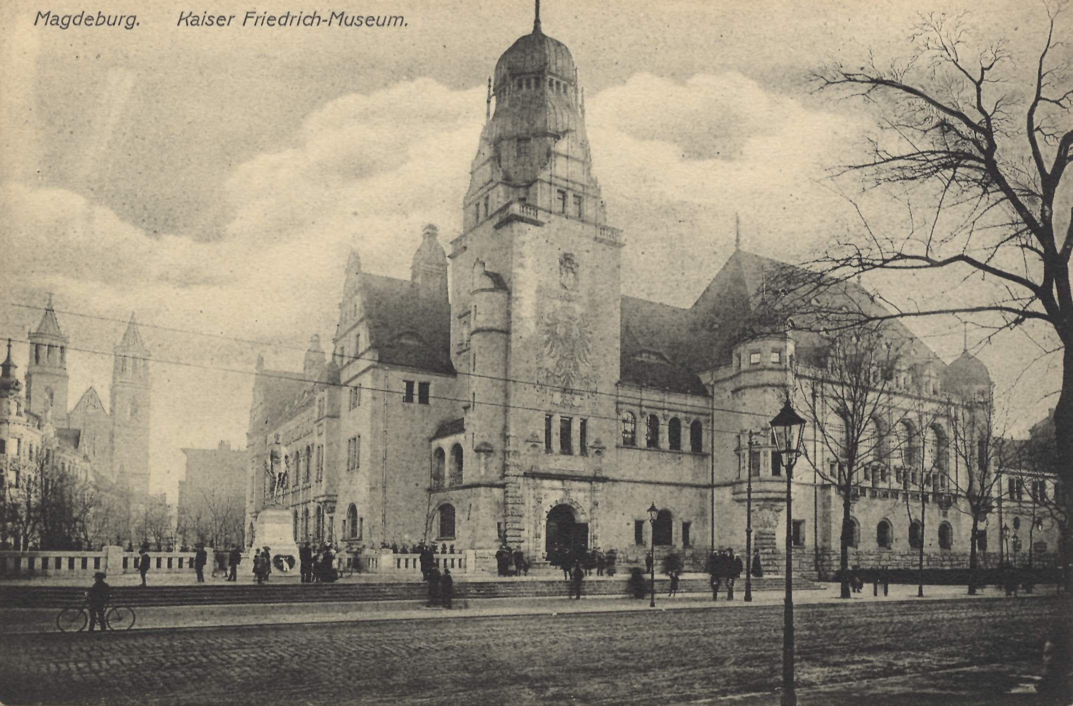 Ansichtskarte des 1901-1906 erbauten Kaiser-Friedrich-Museums in Magdeburg